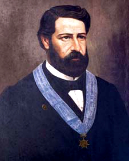 José Gálvez Egúsquiza (1819 - 1866) abogado y político peruano que llegó a ser ministro de guerra y marina. Fue uno de los héroes del combate del Dos de Mayo de 1866 en El Callao.